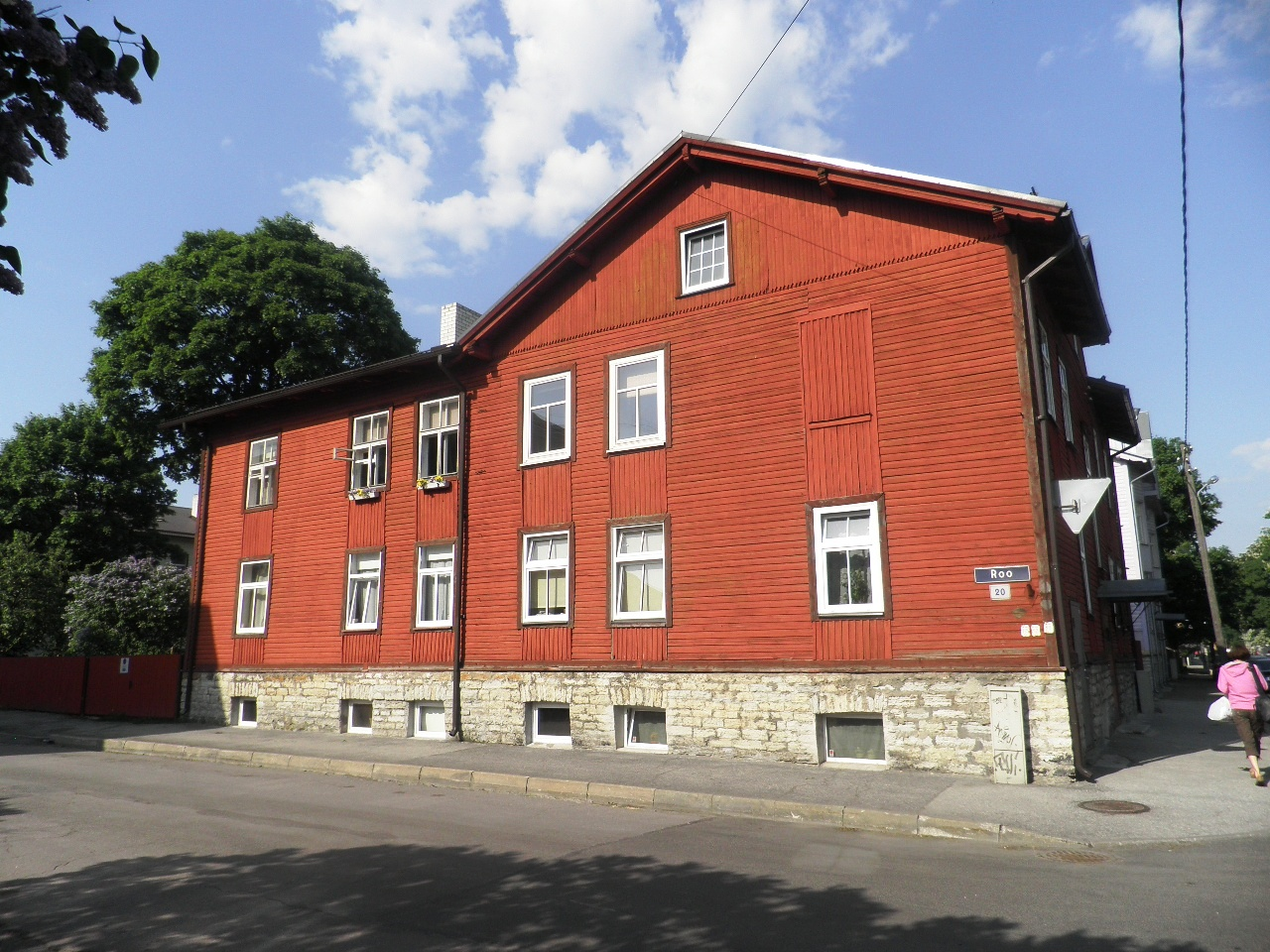 Härjapea 28 / Roo 20, Tallinn